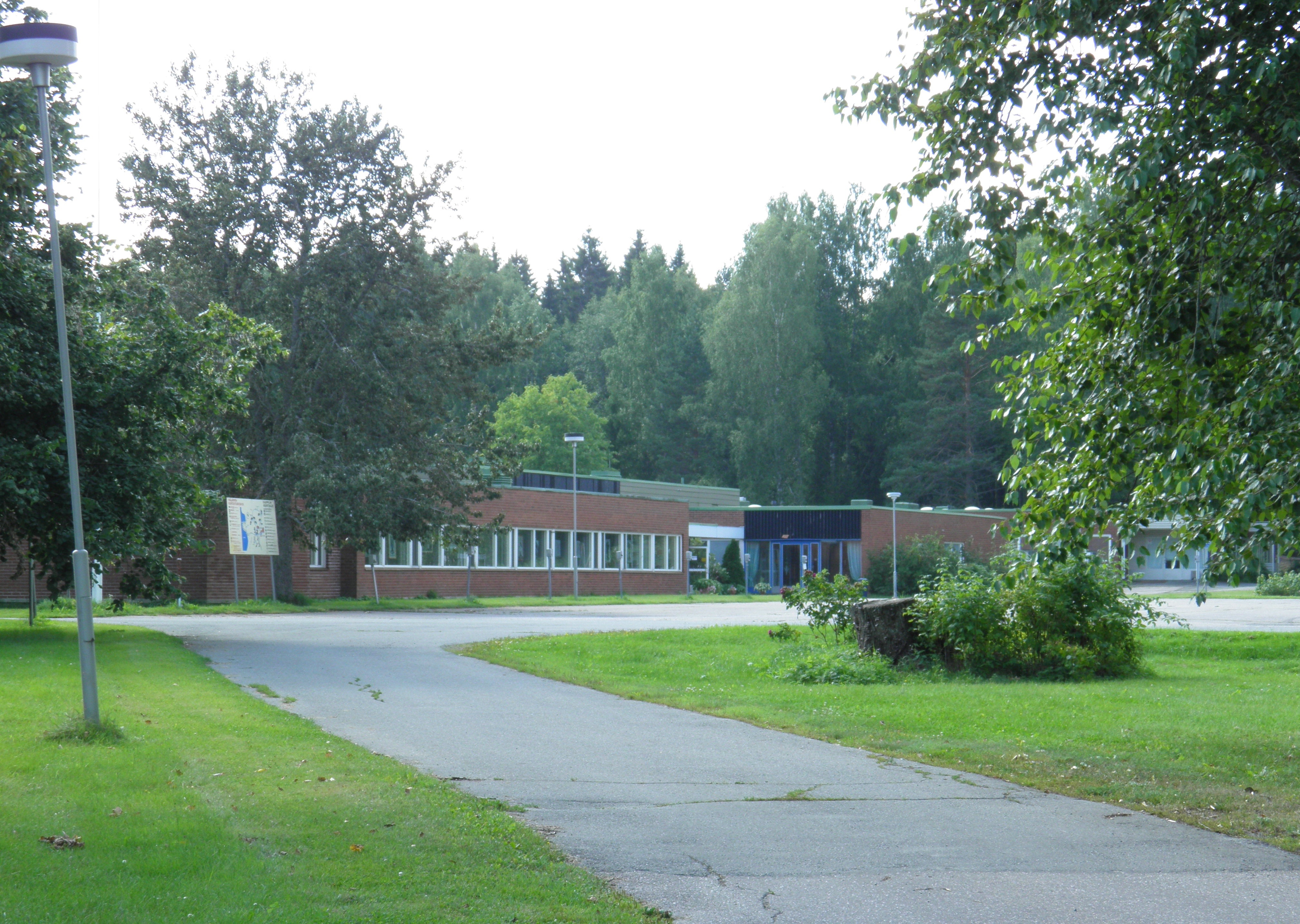 Hämeenlinnan Lammin Ronnissa sijaitseva entisen Pääjärven kuntoutuskeskuksen hallintorakennus, joka on nykyisin Kaikkien Athosvuoren pyhien perintösäätiön Luostarikeskuksen päärakennus.